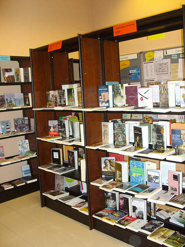 Estantería de novedades en la sala de Préstamo de la Biblioteca Provincial de la Diputación de A Coruña